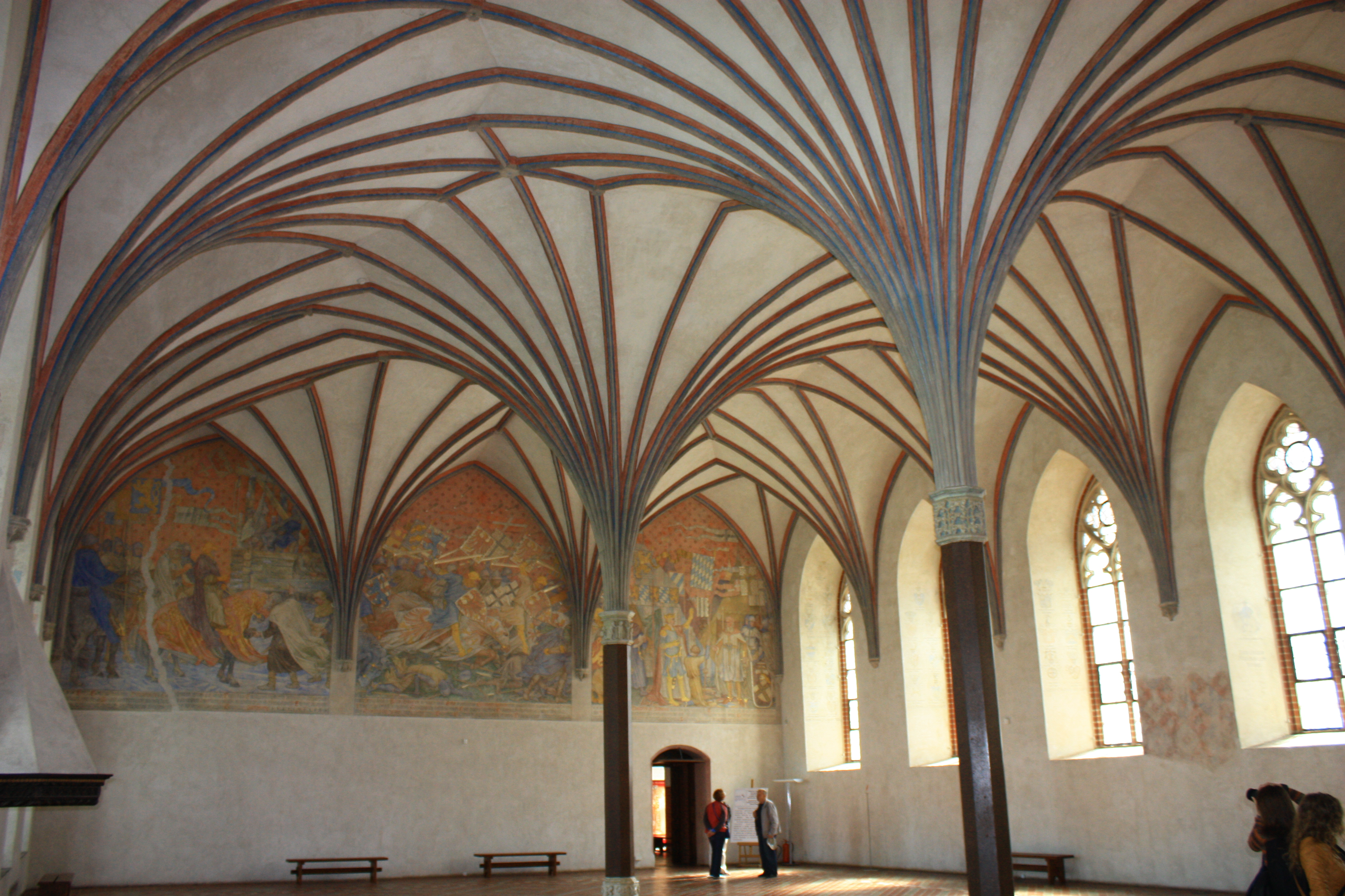 Malbork, zespół zamku krzyżackiego, XIII, XIX